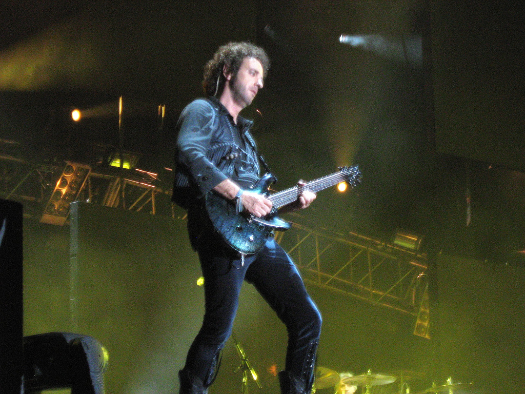 "Te vimos volver". Soda Stereo en Santiago de Chile, en el Estadio Nacional. En imágen Gustavo Cerati. Concierto del 24 de octubre. Gira: Me Verás Volver.